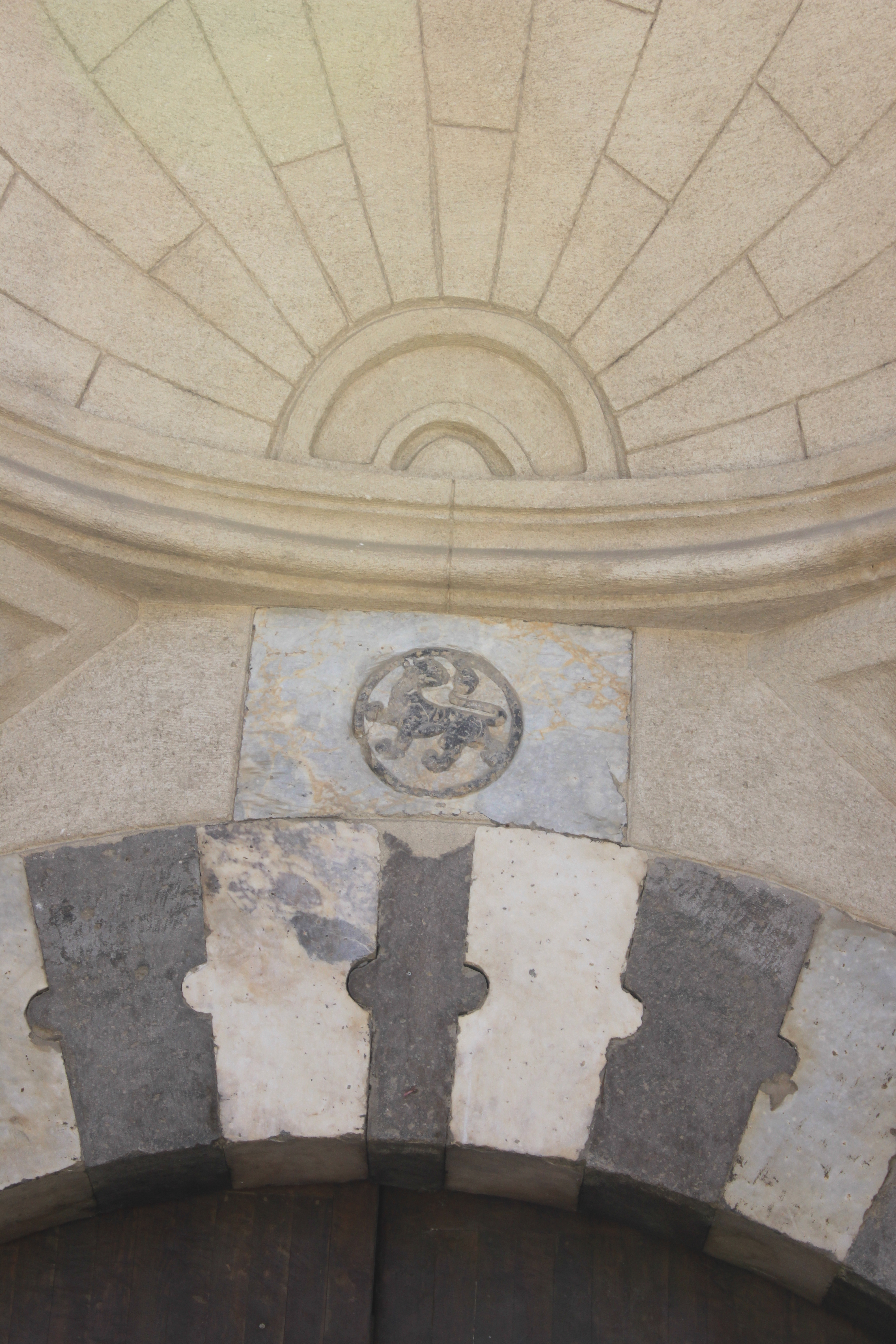 Löwensymbol der Seldschuken über den Eingang des Taş Han in Çay.